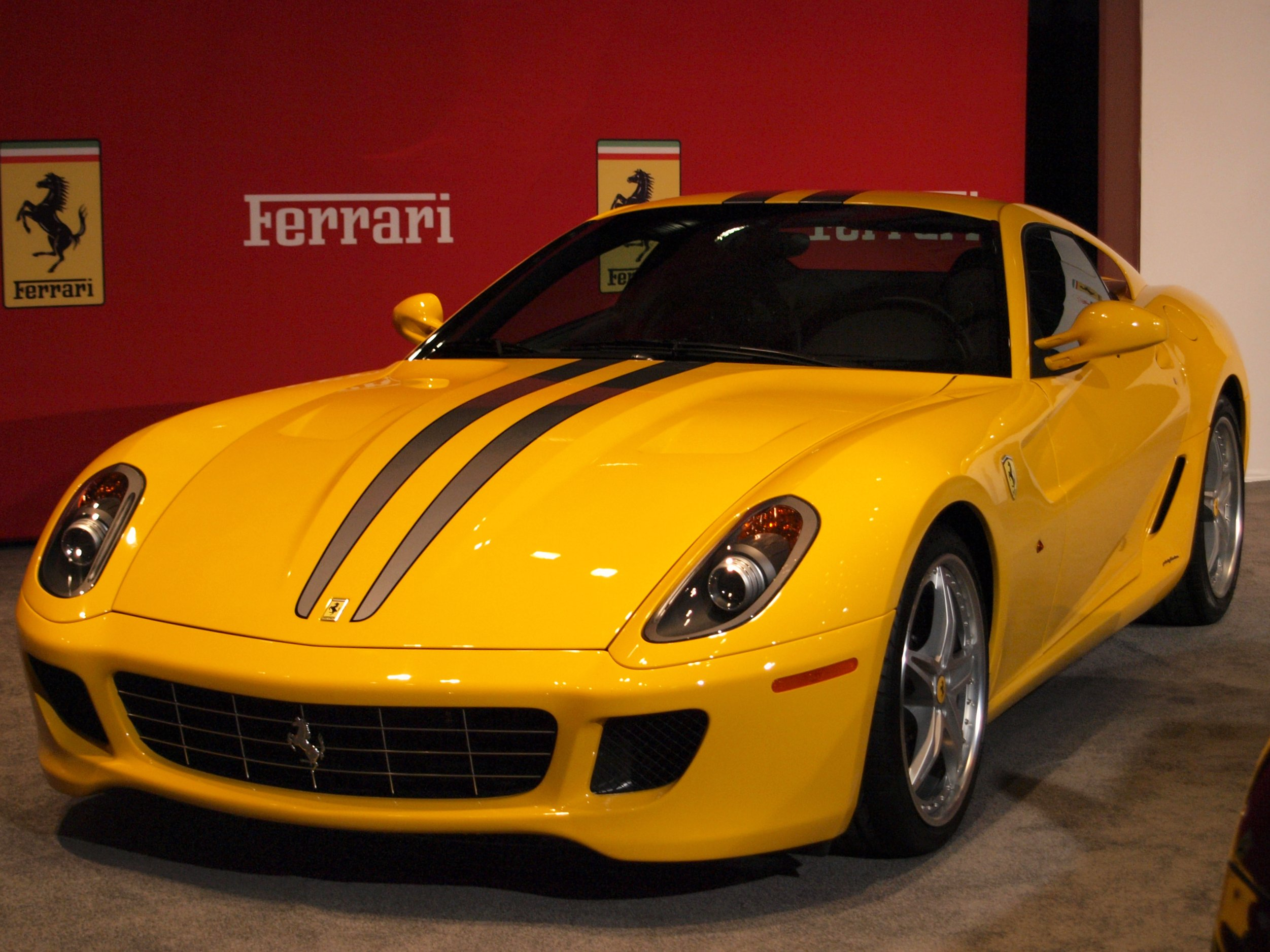 2011 Ferrari 599 GTB Fiorano